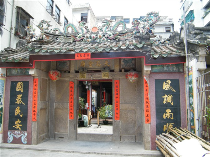 达濠厂前街天后圣庙 2009.7.29